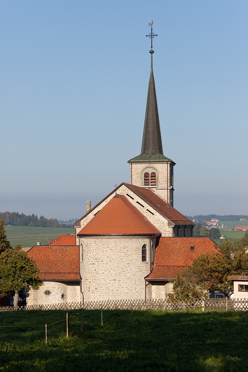 Eglise Saint-Nicolas à Semsales (FR)